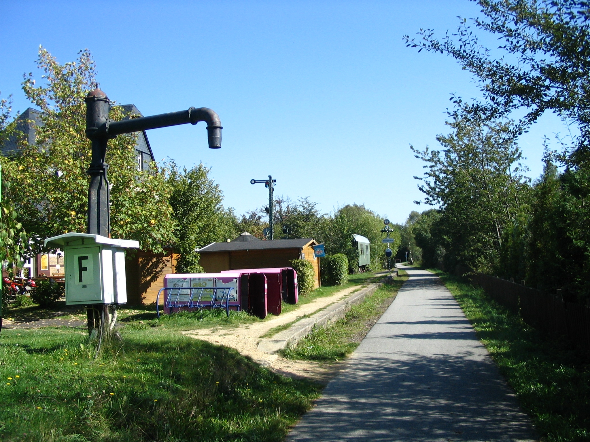 Schinderhannesradweg im Bereich Bahnhof Pfalzfeld